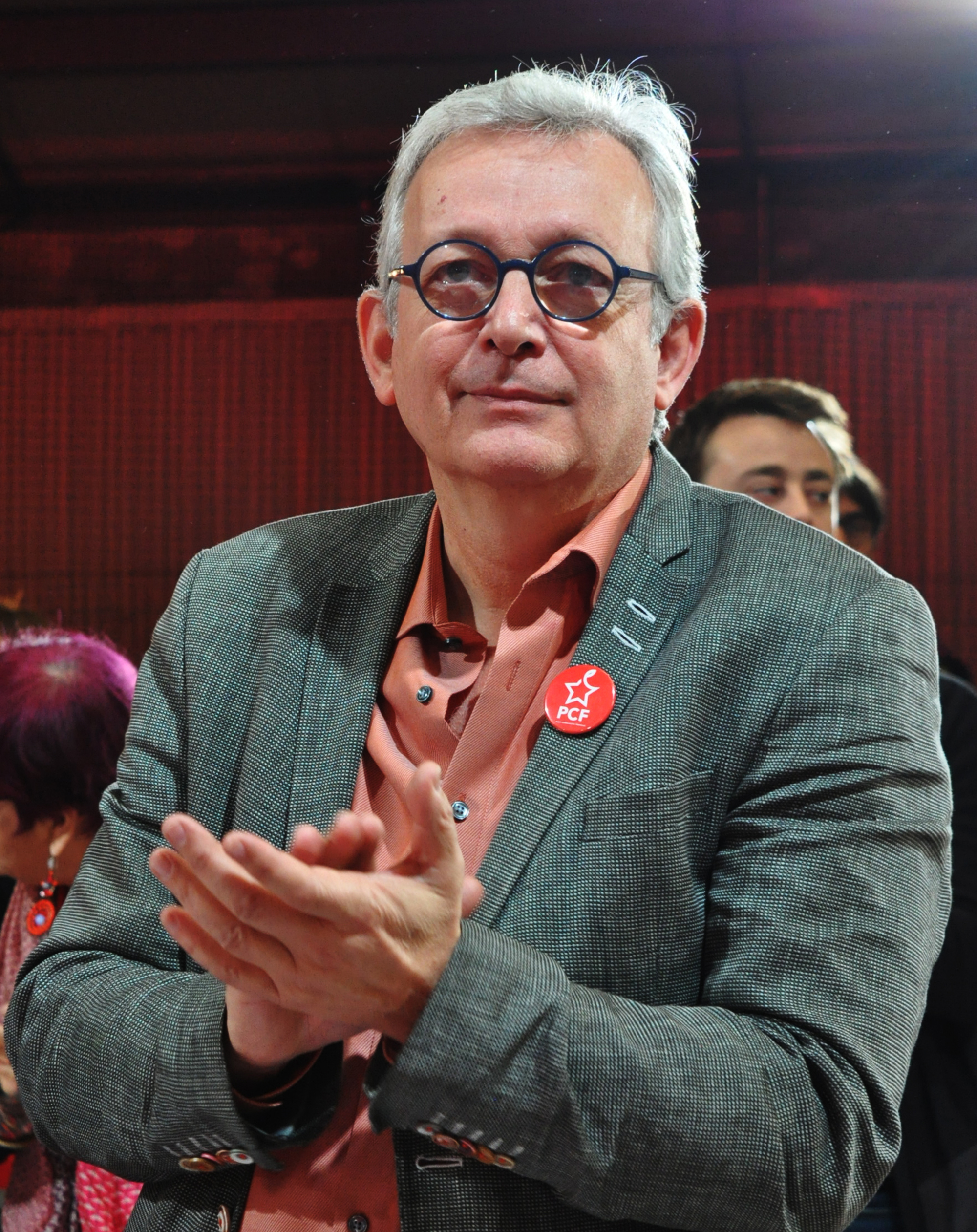 Pierre Laurent, lors du 38e Congrès du PCF.